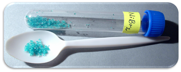 Bromid nikelnatý